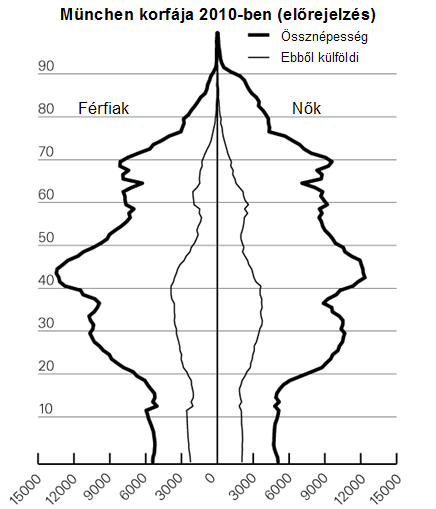 A müncheniek várható korfája 2010-ben, külön jelezve vannak ebből a külföldiek